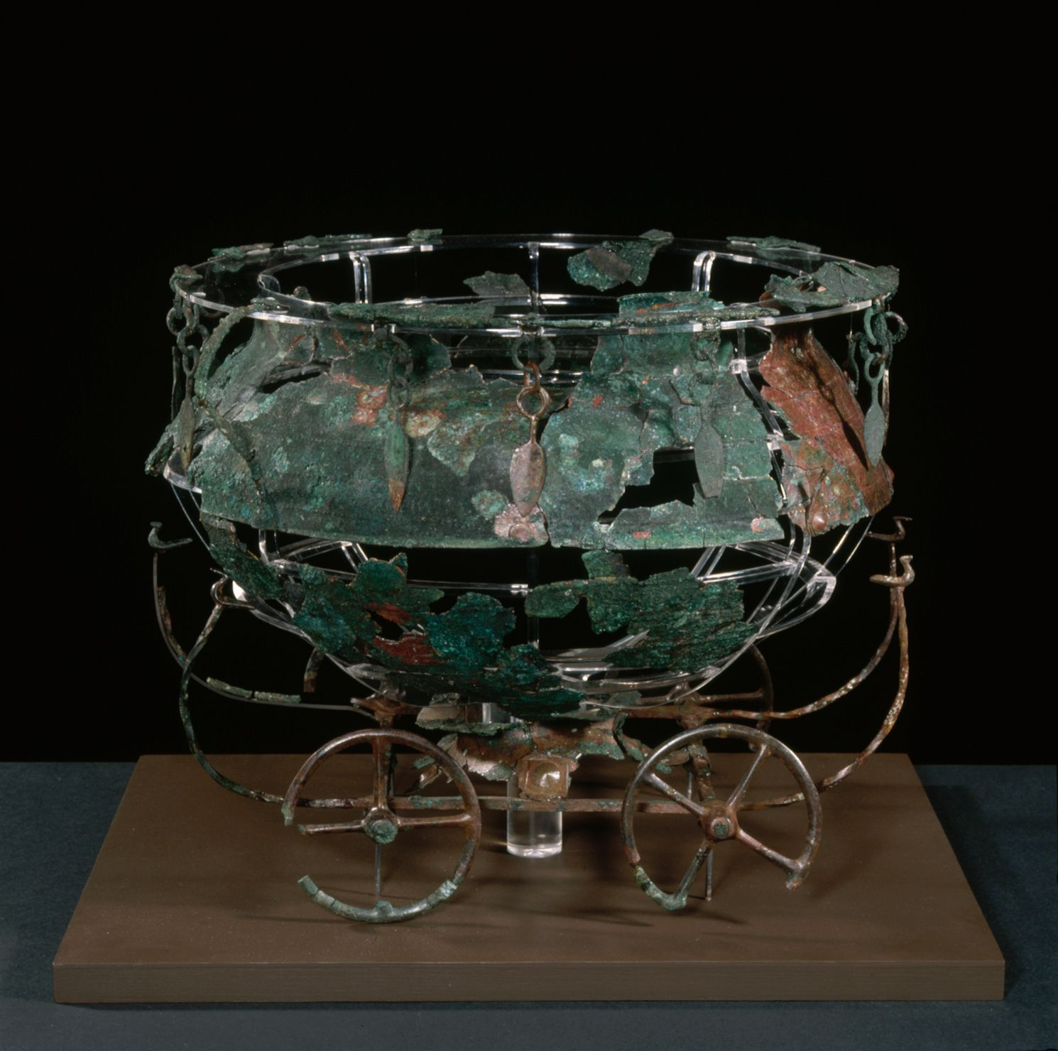 Kedelvogn af bronze fra Skallerup (Trushøj), Udby sogn. Æl. br.